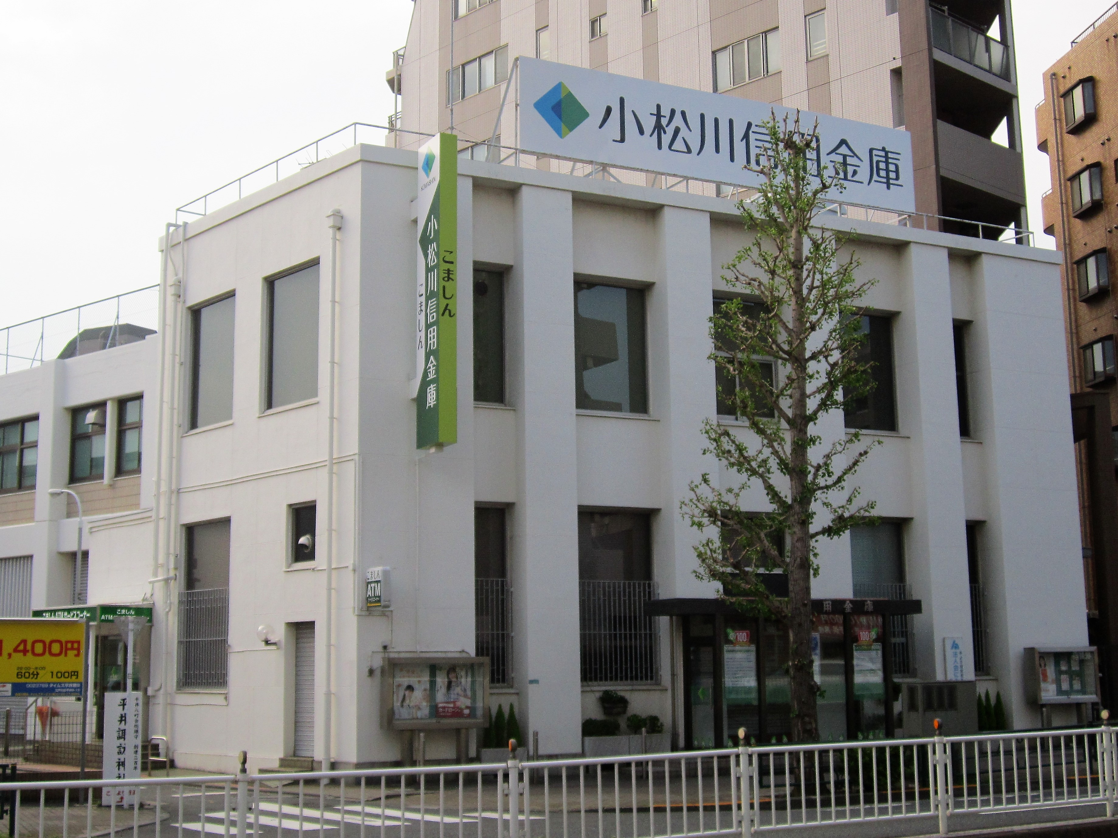 小松川信用金庫 本部・本店（江戸川区平井）